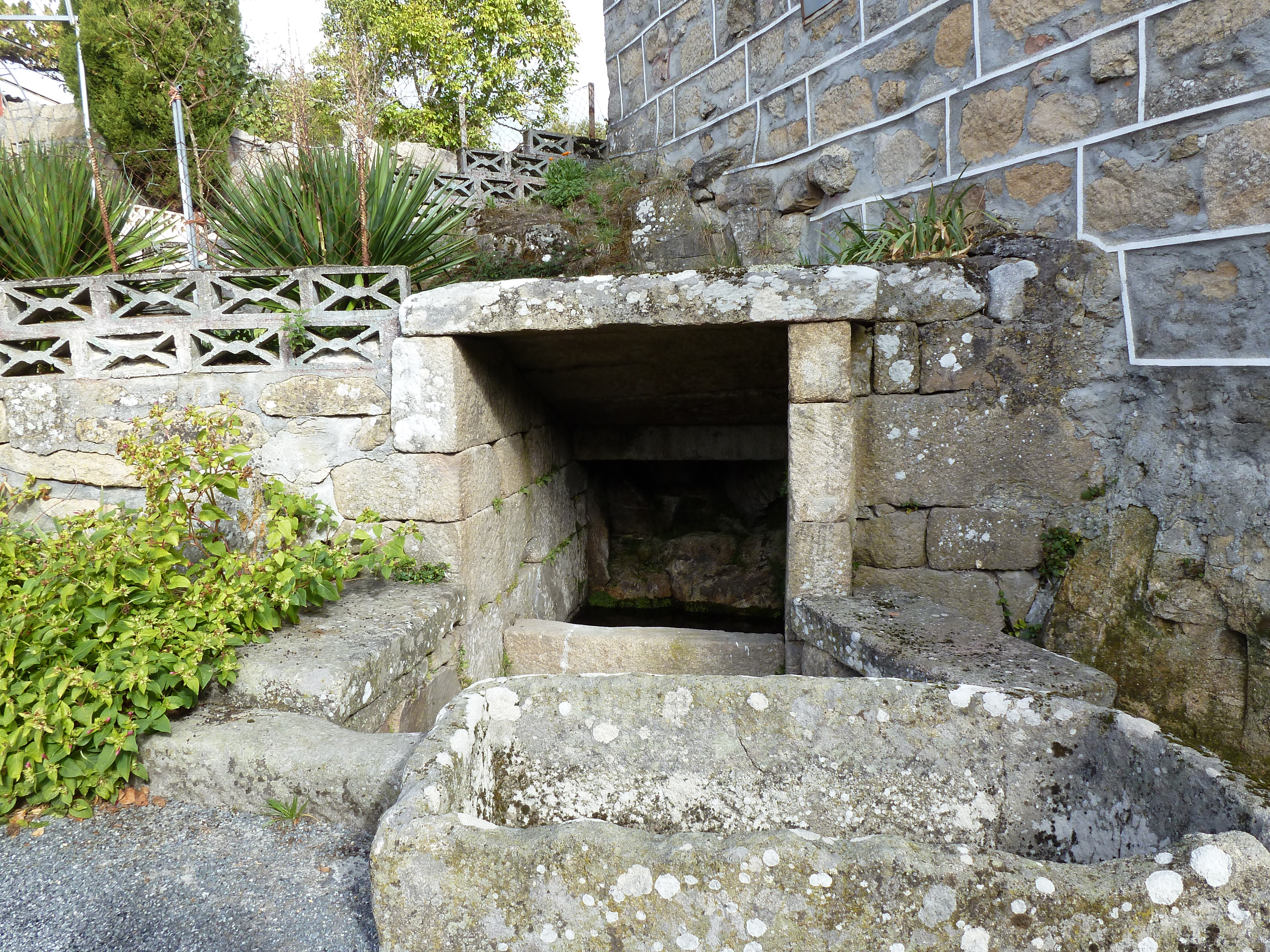 Padroso, Sarreaus